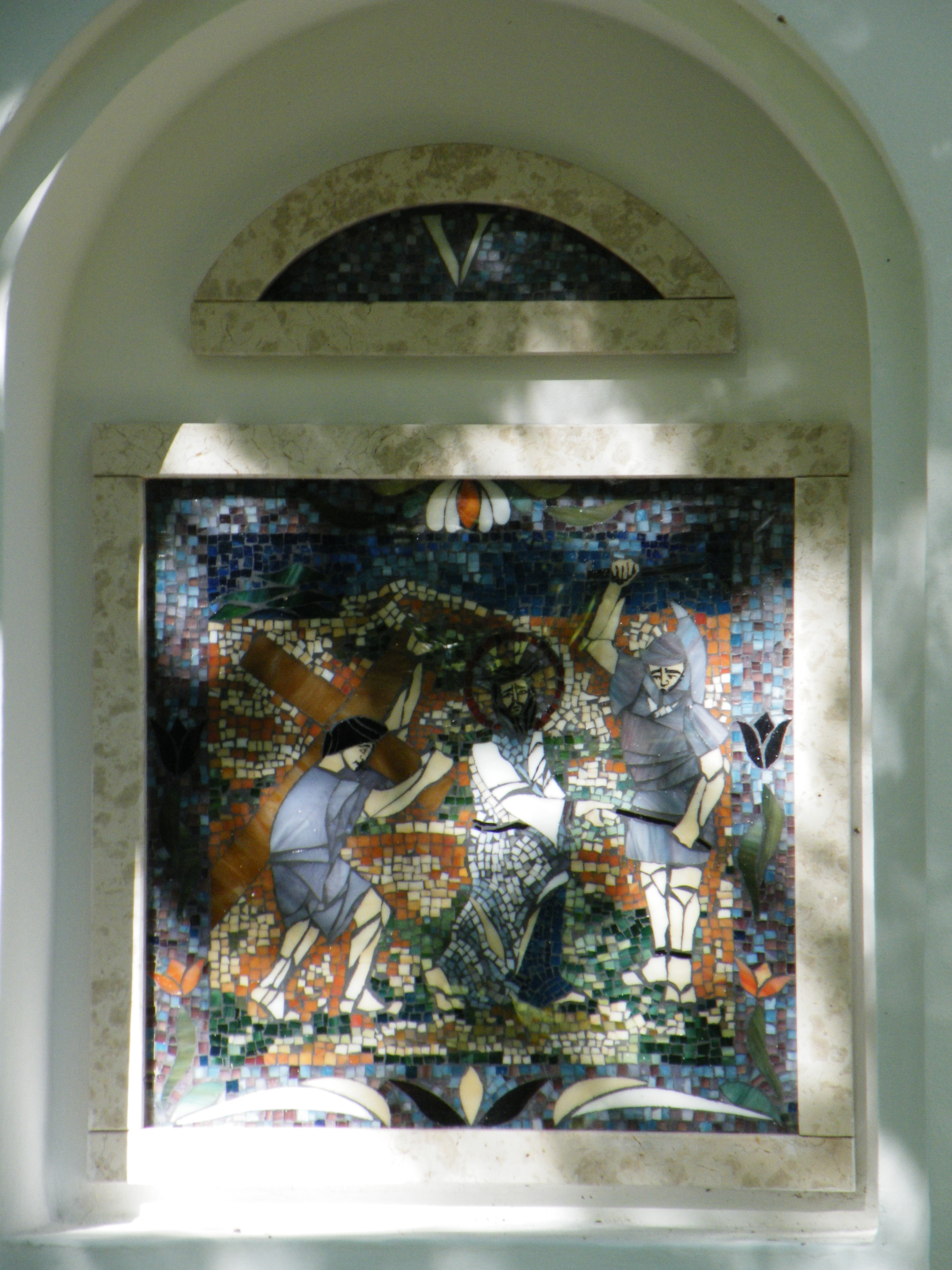 Stációk a Palóc ligetben, Balassagyarmaton